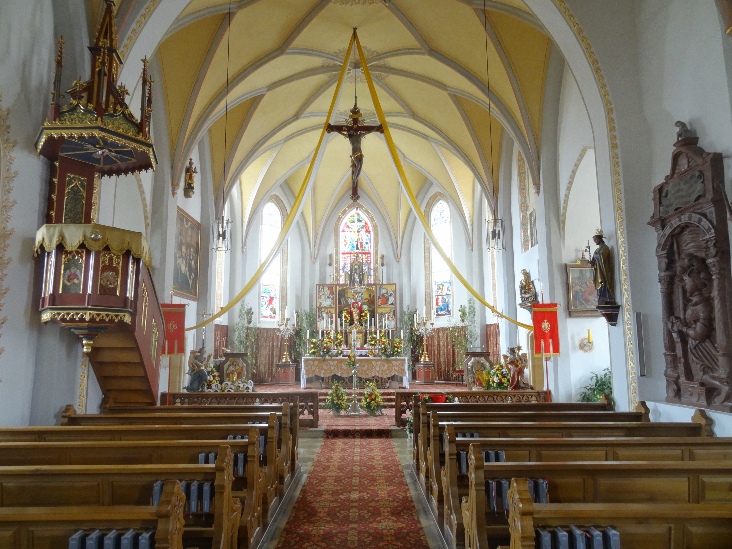 Innenansicht der röm.-kath. Pfarrkirche St. Georg in Gerzen (Lkr. Landshut, Bayern)